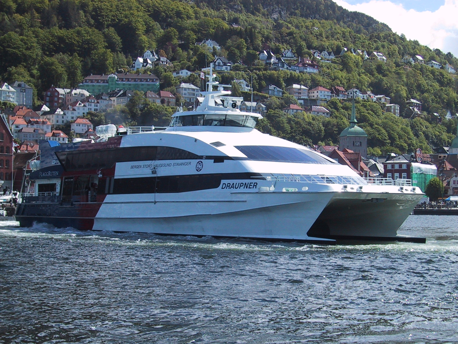 M/S Draupner, built 1999, in Bergen harbour.